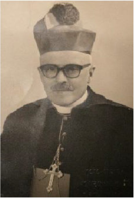 Monsignor Raffaelangelo Palazzi